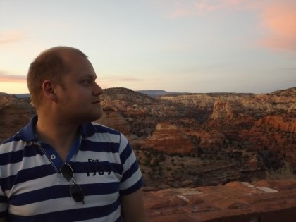 Arnaud Stiepen au Colorado